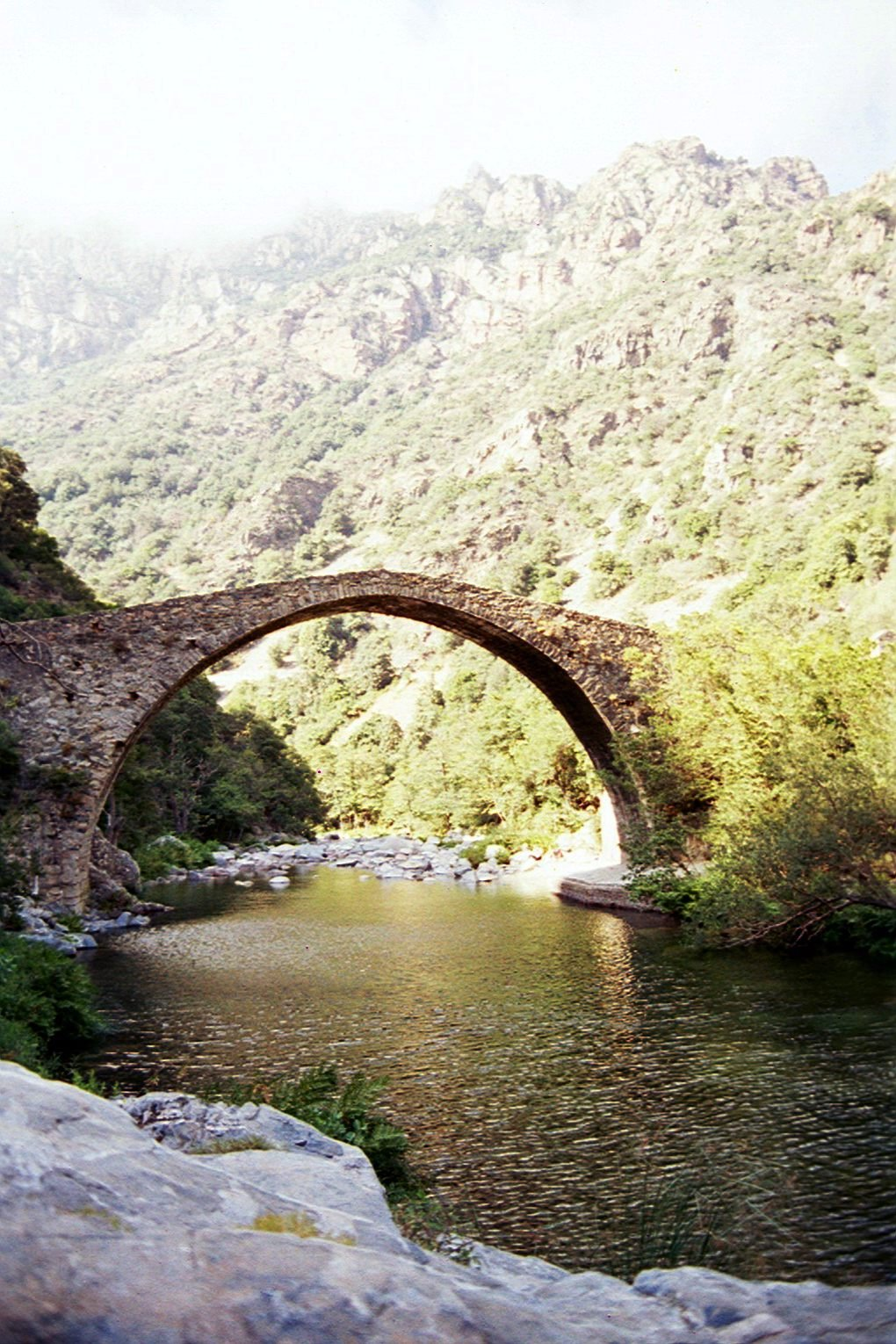 Gorges de Spelunca, Corsica.